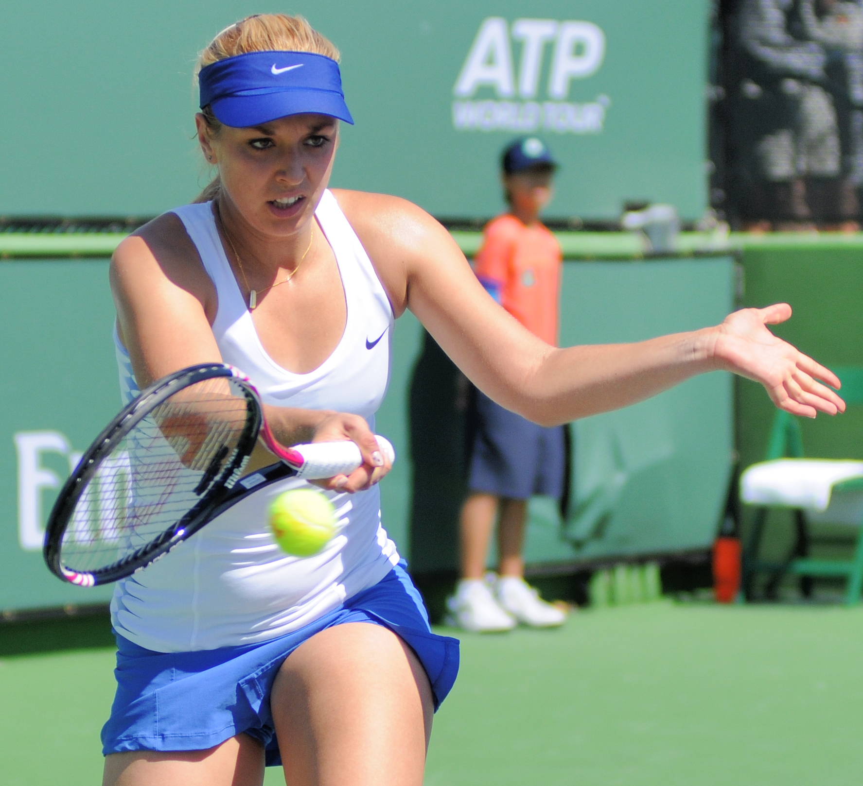 BNP Paribas Open 2012